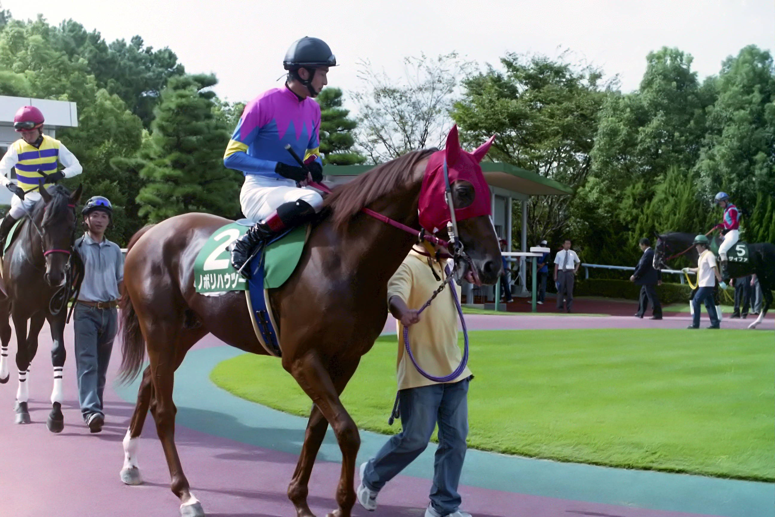 ノボリハウツー